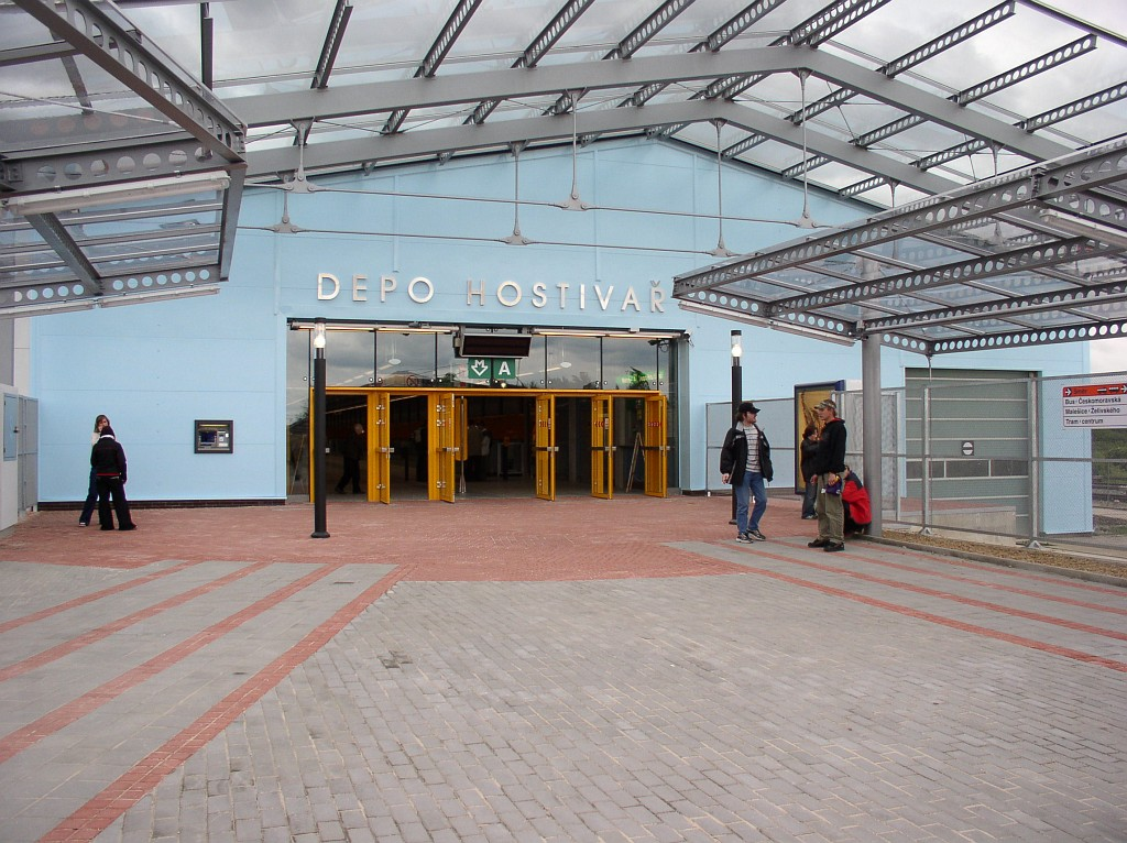 Metro station Depo Hostivař in Prague, entrance – Stanice metra Depo Hostivař, vstup